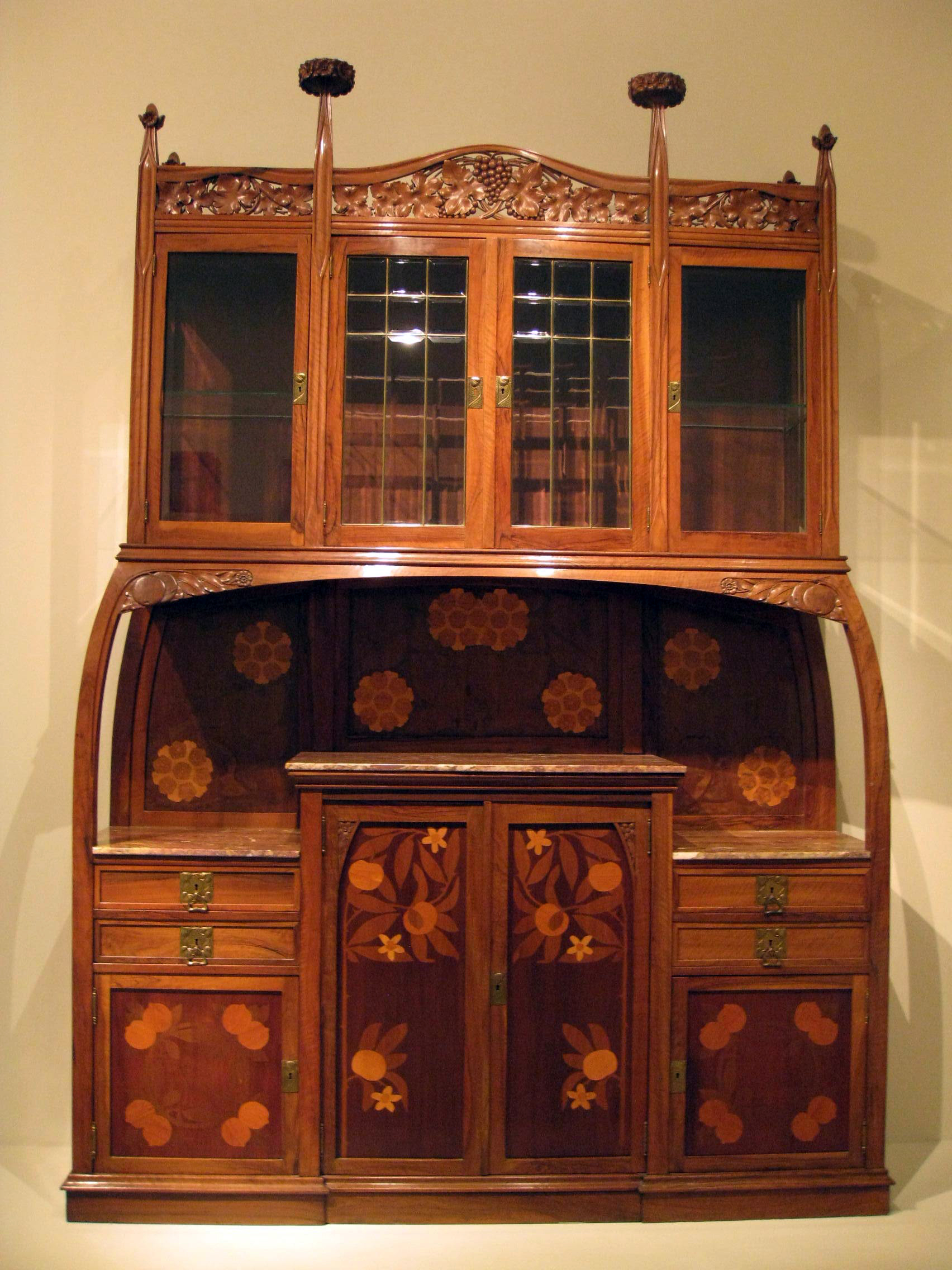 Palau Nacional (Barcelona)